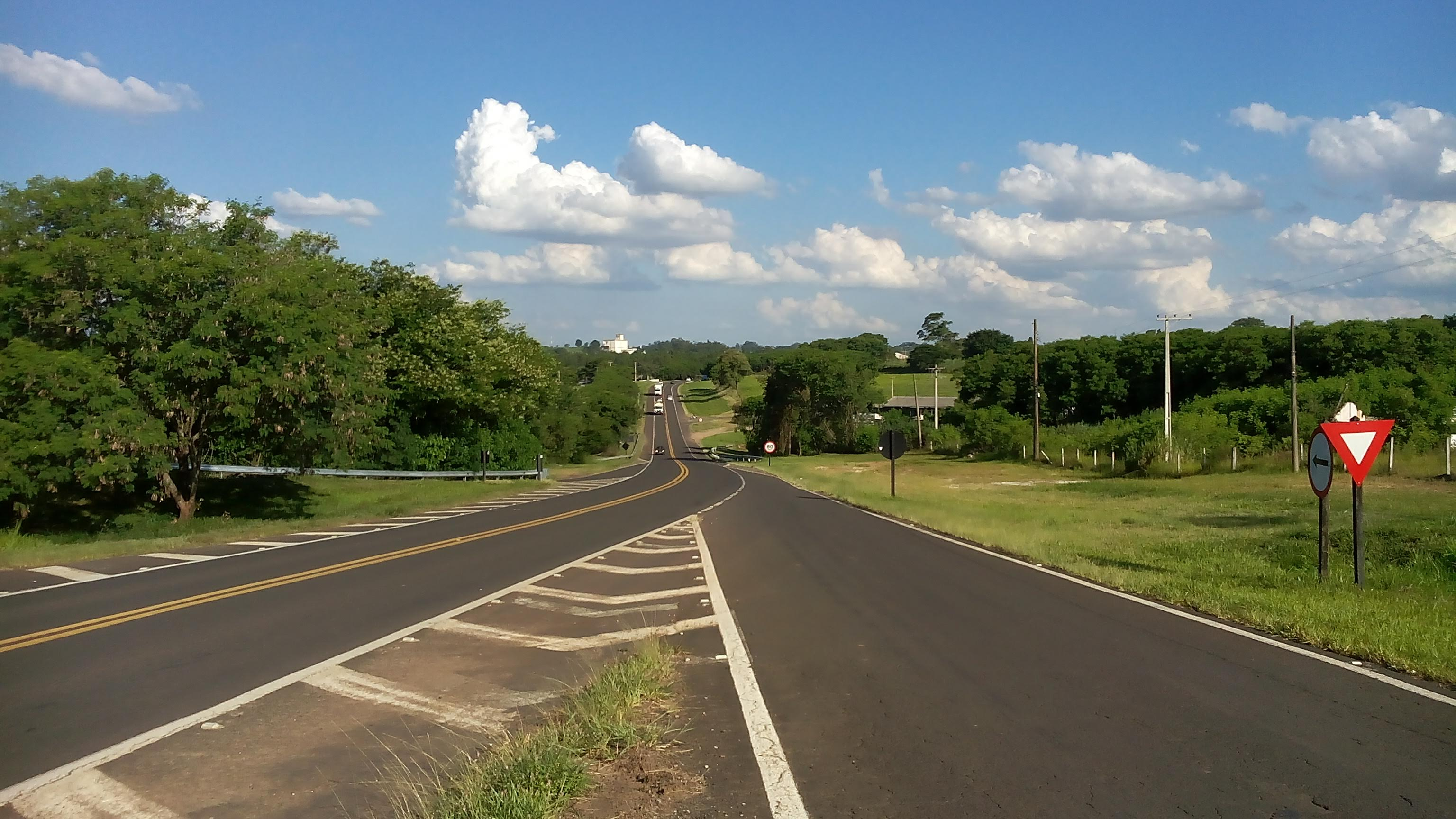 Vista para a Rodovia Marechal Rondon (SP-300), sentido capital, no km 174, "Trevo do Portal", em Laranjal Paulista.